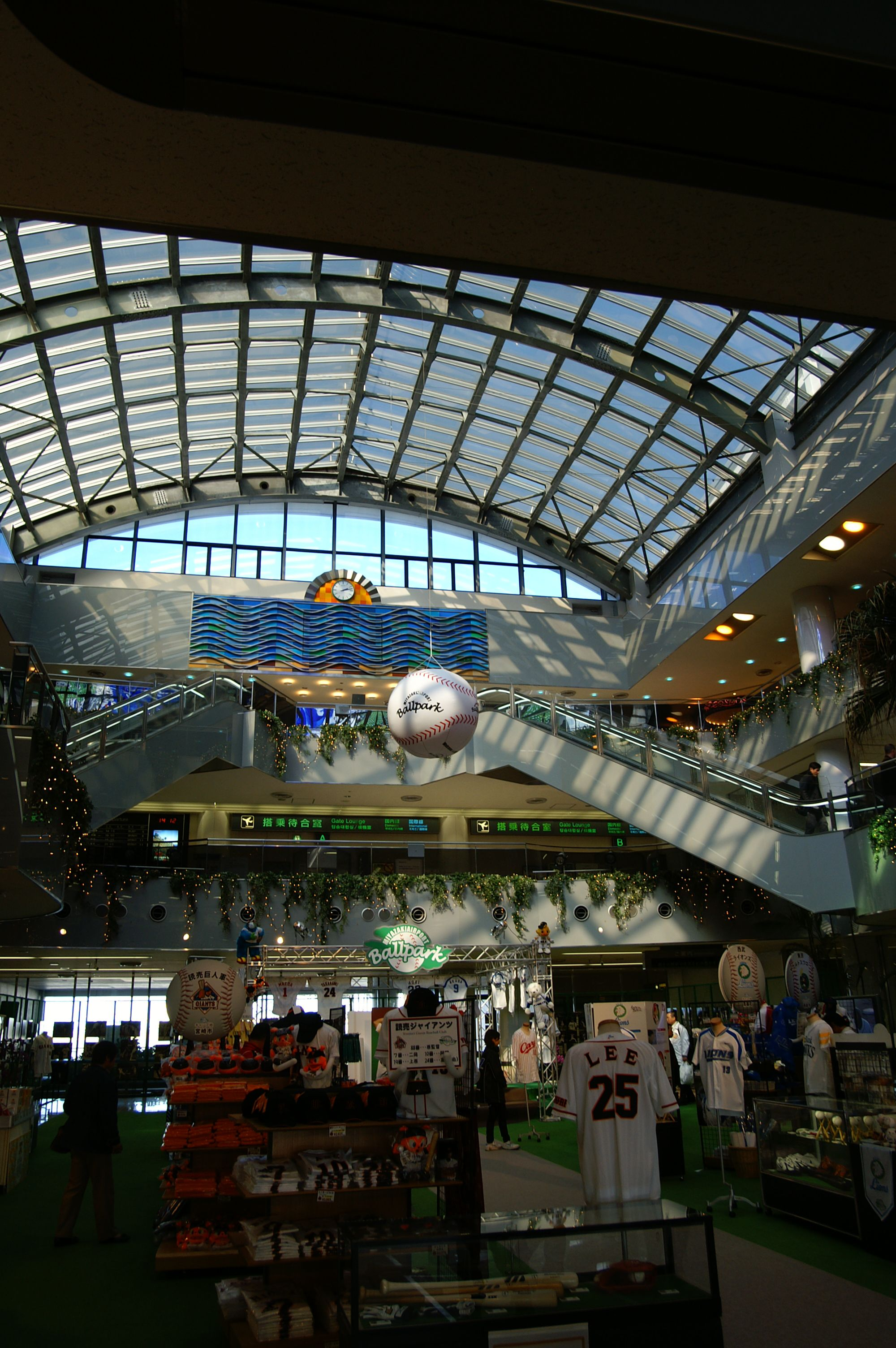 (2007/02/12 Miyazaki Airport, Miyazaki, JAPAN)